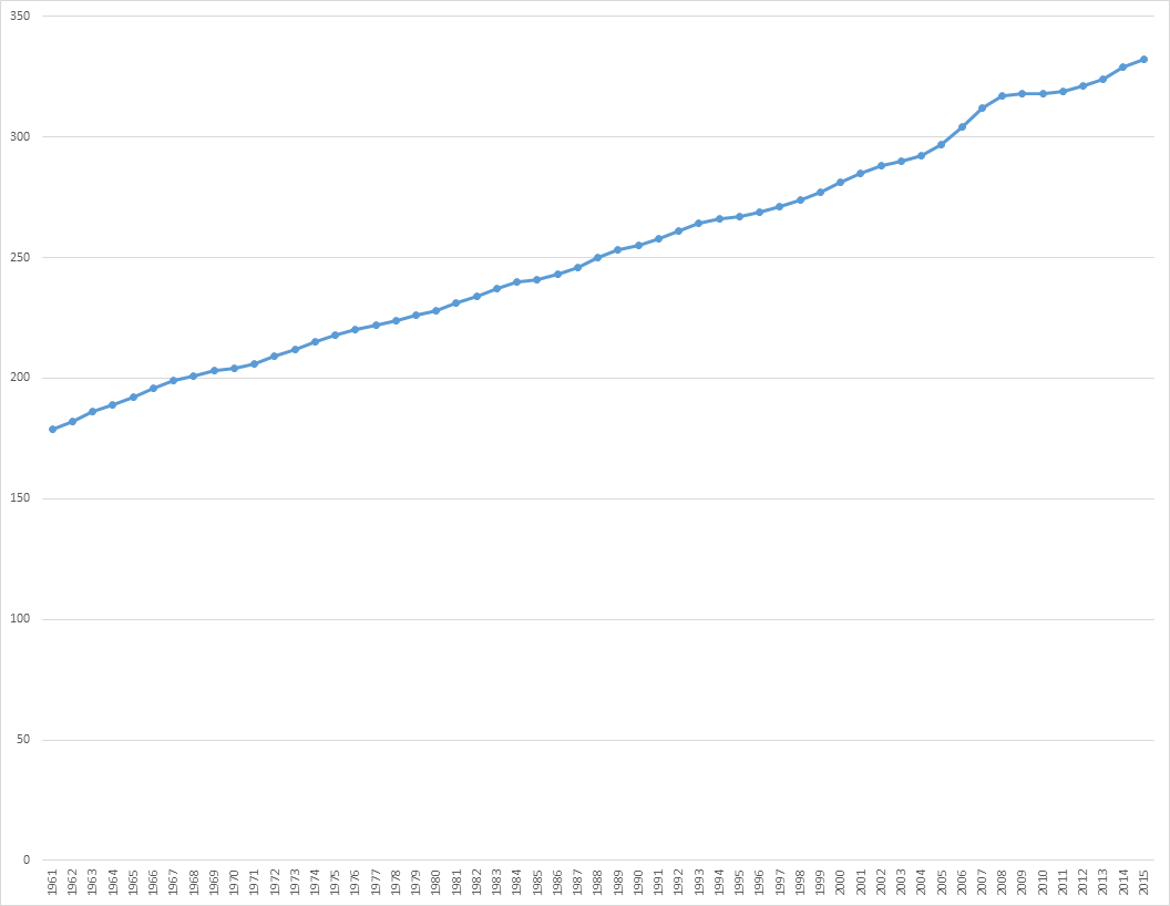 Evolución de la población de Islandia (1961-2015).